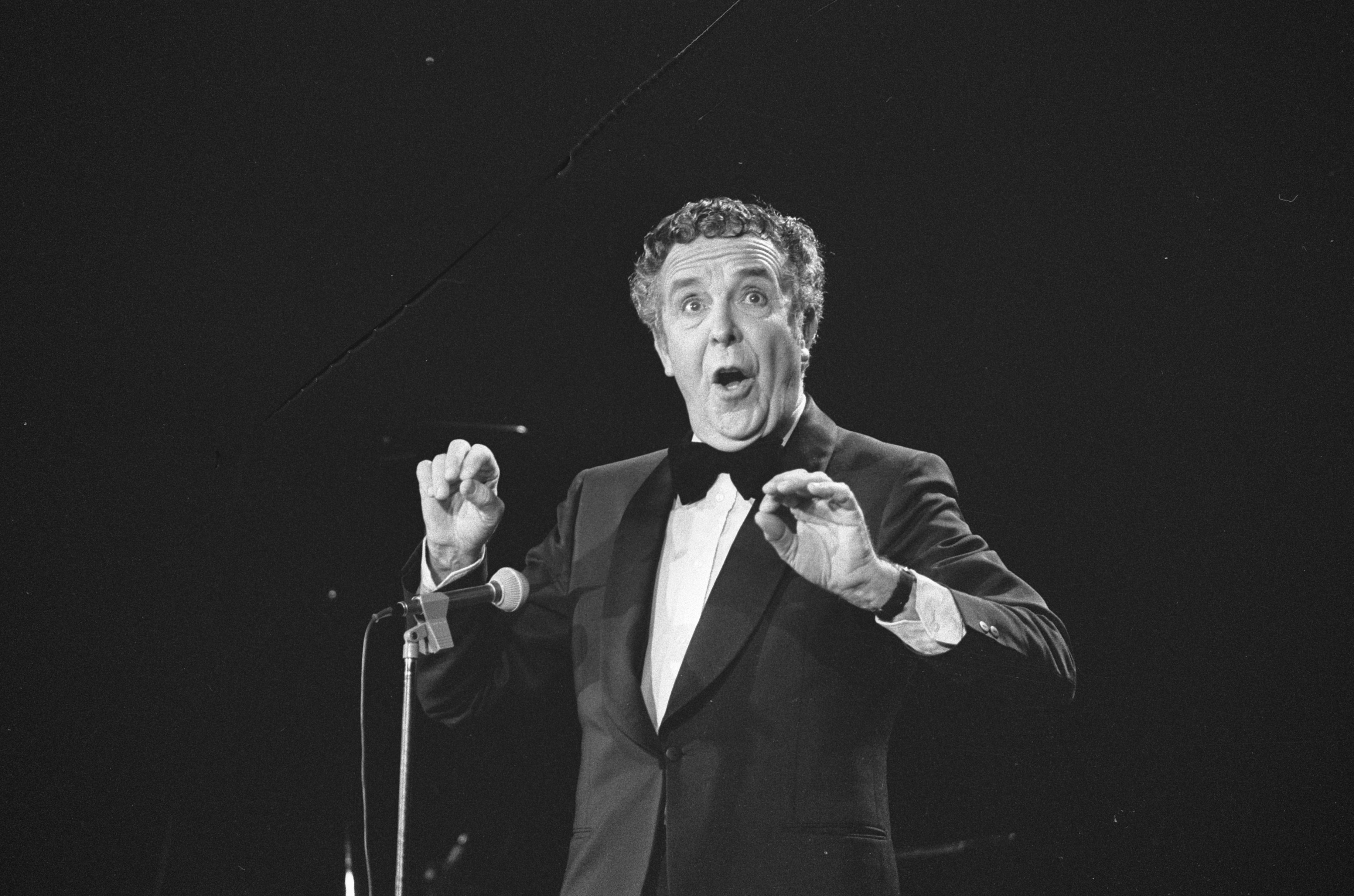 Collectie / Archief : Fotocollectie Anefo Reportage / Serie : VARA-tv maakt opnamen van de oudejaarsconference van Wim Kan Beschrijving : Wim Kan tijdens de opnamen Datum : 28 december 1973 Locatie : Hilversum, Noord-Holland Trefwoorden : conferenciers, televisieopnamen Persoonsnaam : Kan, Wim Fotograaf : Fotograaf Onbekend / Anefo Auteursrechthebbende : Nationaal Archief Materiaalsoort : Negatief (zwart/wit) Nummer archiefinventaris : bekijk toegang 2.24.01.05 Bestanddeelnummer : 926-9083